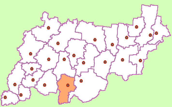 Kostroma Oblast map by Al Silonov Карта районов Костромской области